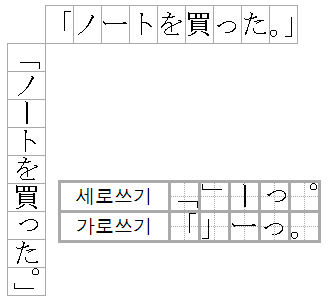 가로쓰기와 세로쓰기의 차이점을 일본어의 사례('공책을 샀다.')를 통해 보여주는 그림.